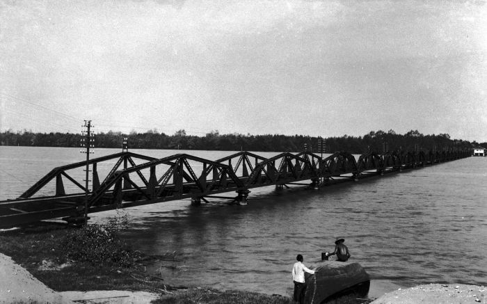 Foto. Spoorbrug over een rivier, waarschijnlijk Oost-Sumatra